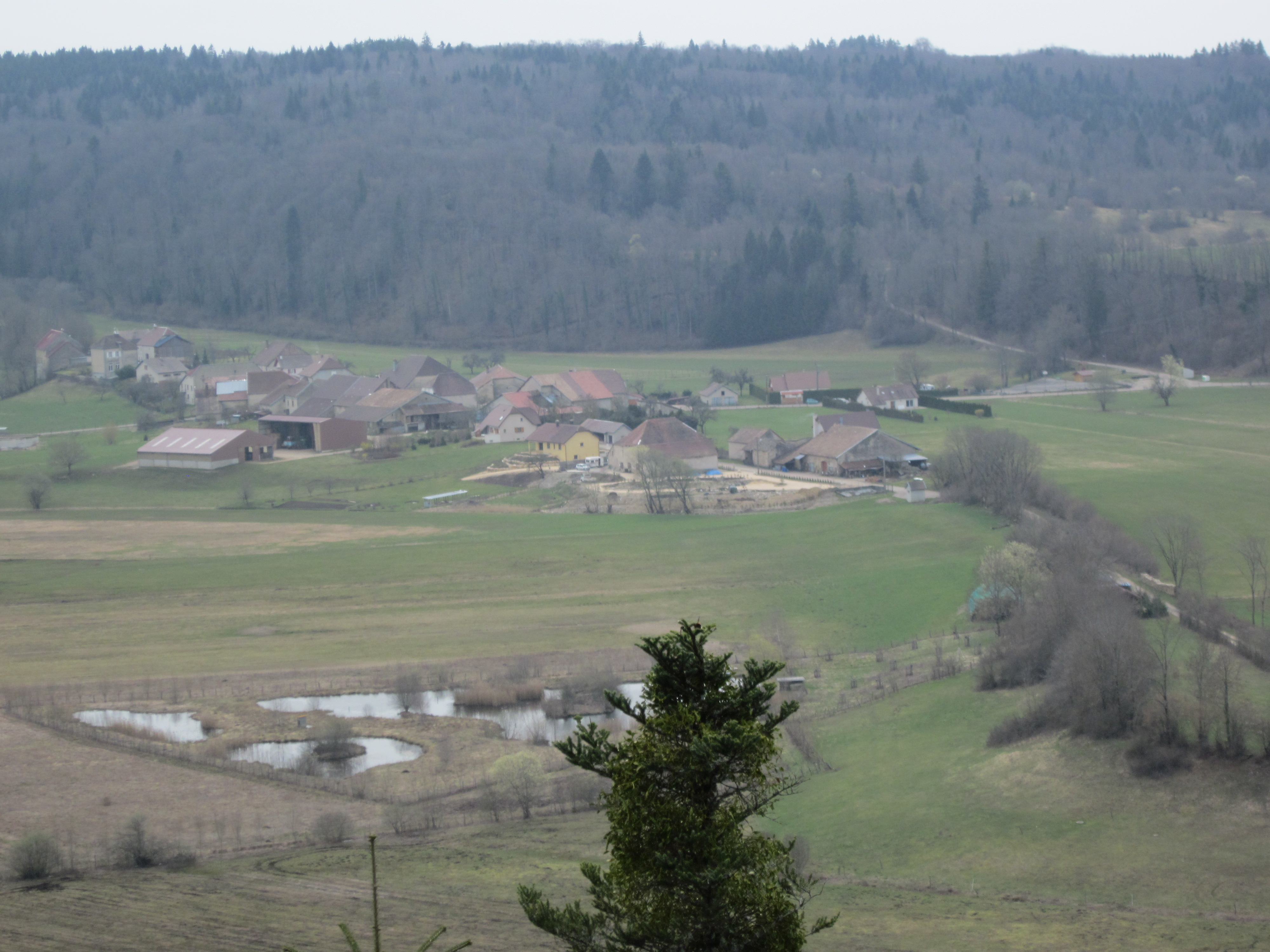 Village de Pillemoine dans le département du Jura